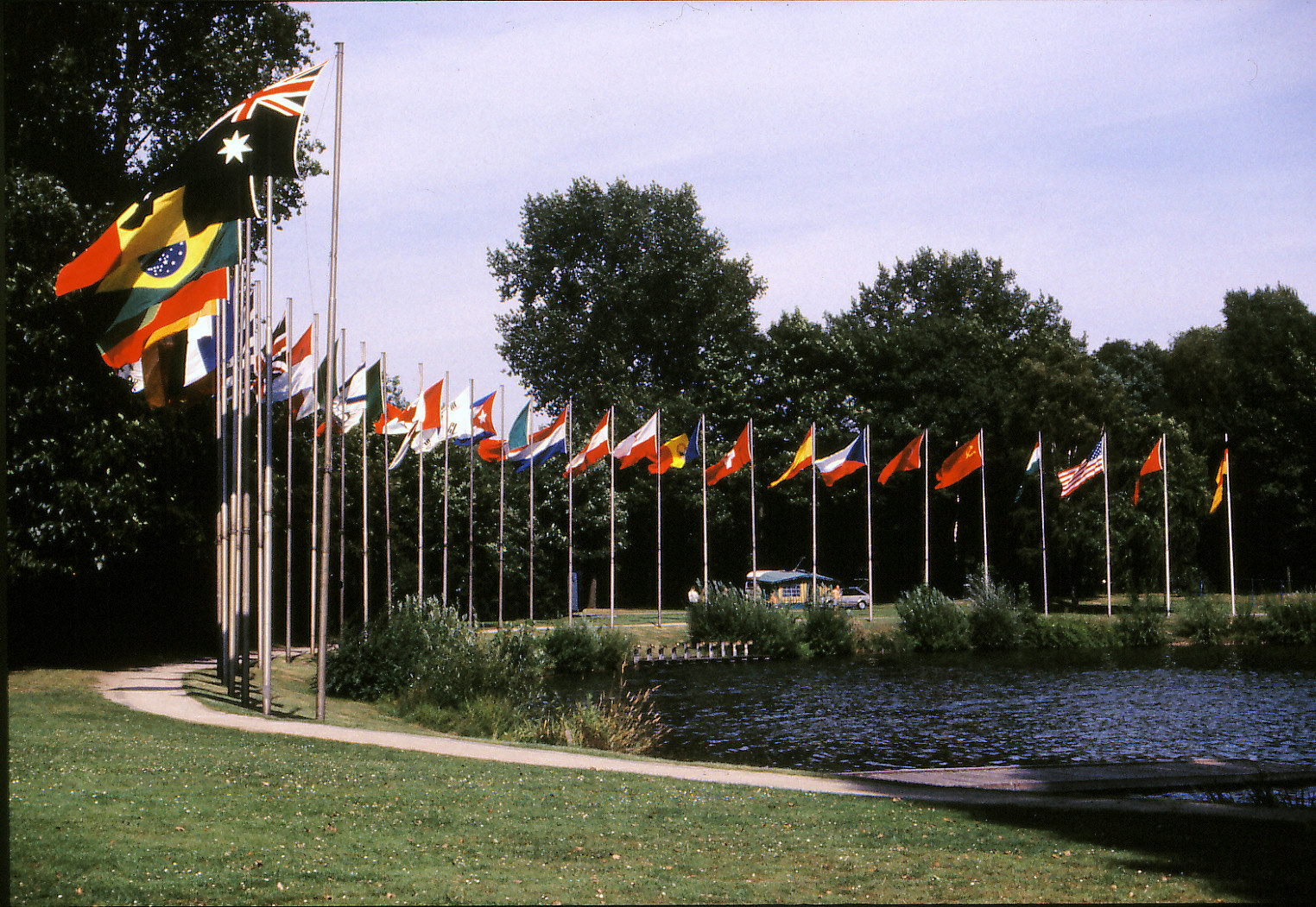 Universiade Duisburg 89